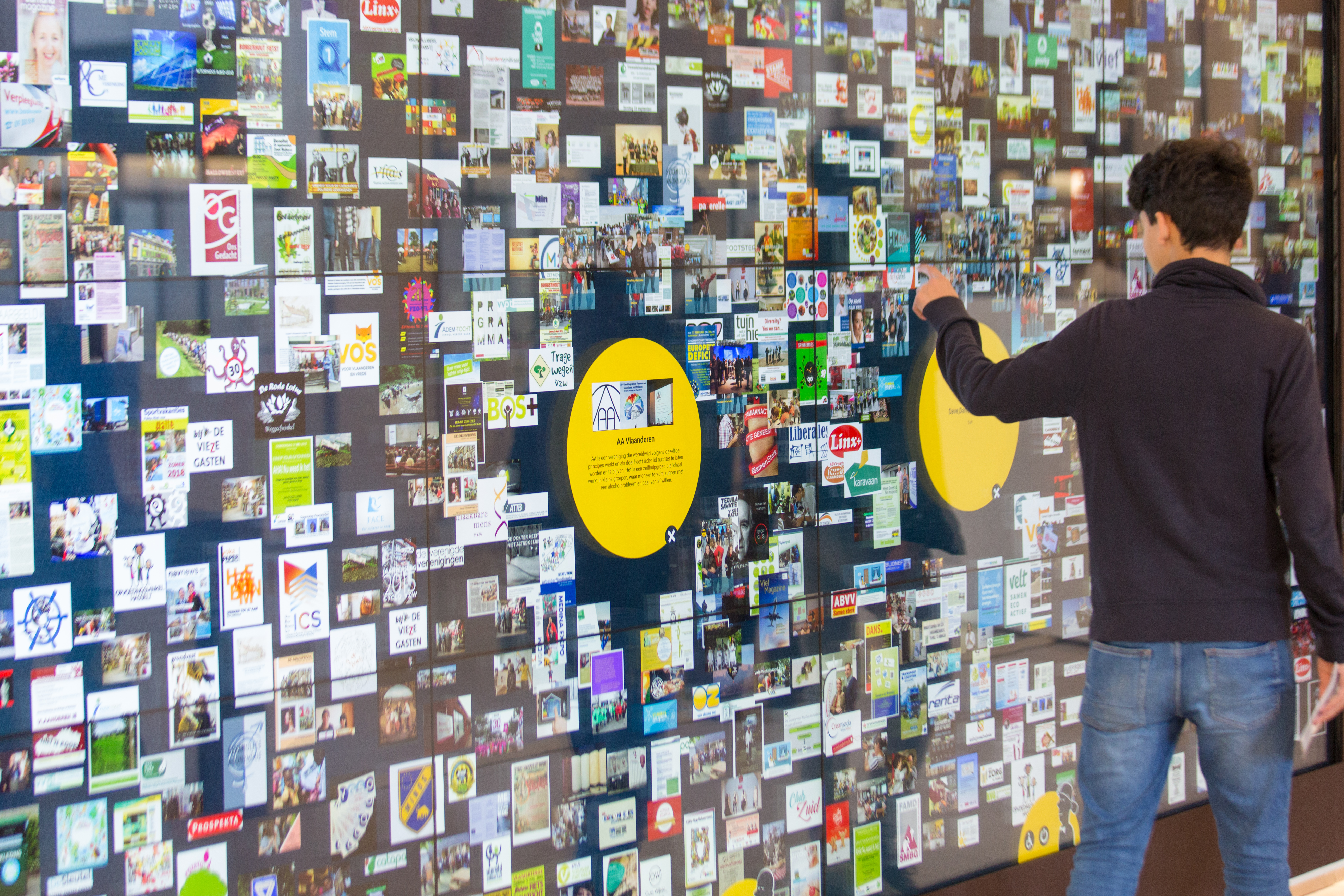 Jongeren ontdekken de interactieve toepassingen